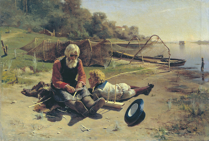 Иллюстрации Николая Алексеевича Богатова (1854-1935)